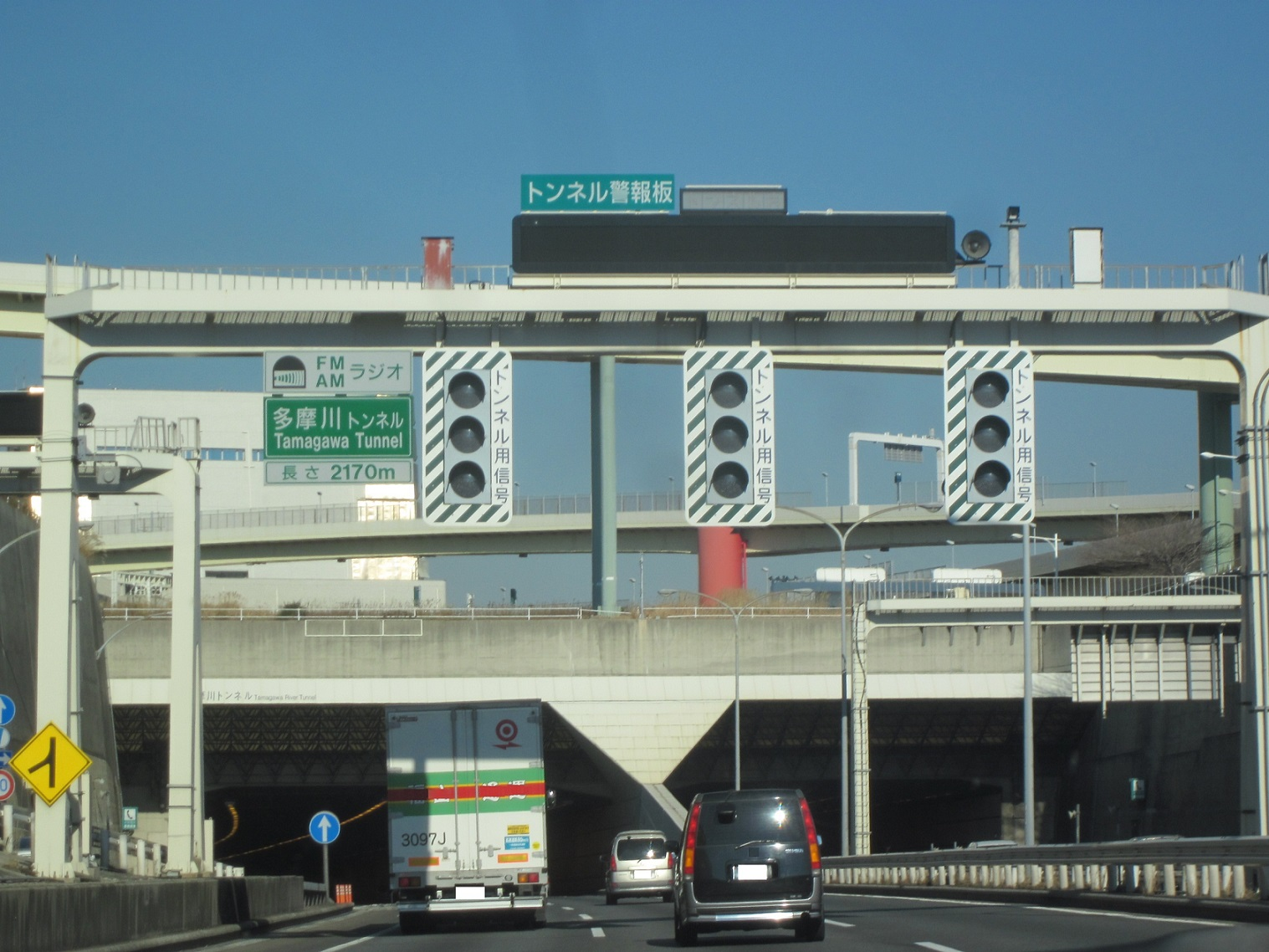 首都高速湾岸線 多摩川トンネルの川崎浮島側(南側)坑口